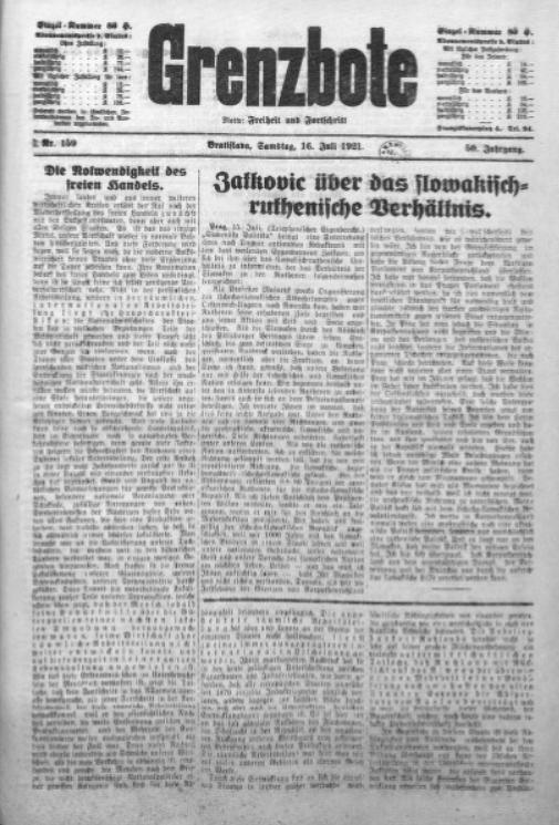 Titulný list denníka Grenzbote.